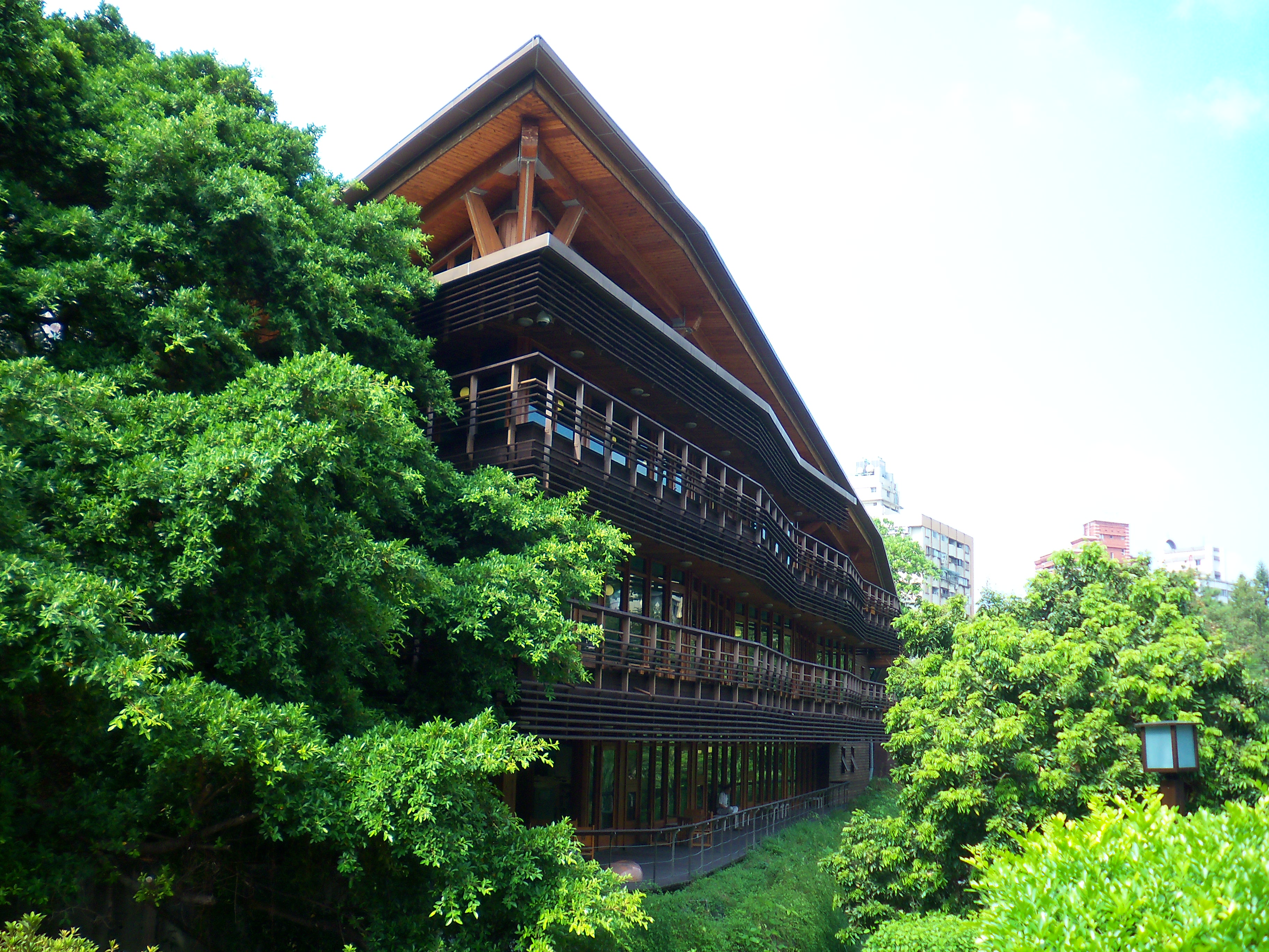 台北市立図書館北投分館。